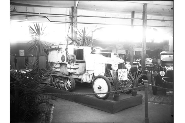 Frank-Henri Jullien (1882-1938), Le Salon de l’automobile au Bâtiment électoral, 1924, négatif au gélatino-bromure d’argent sur verre, inv. VG N 18 x 24 7241